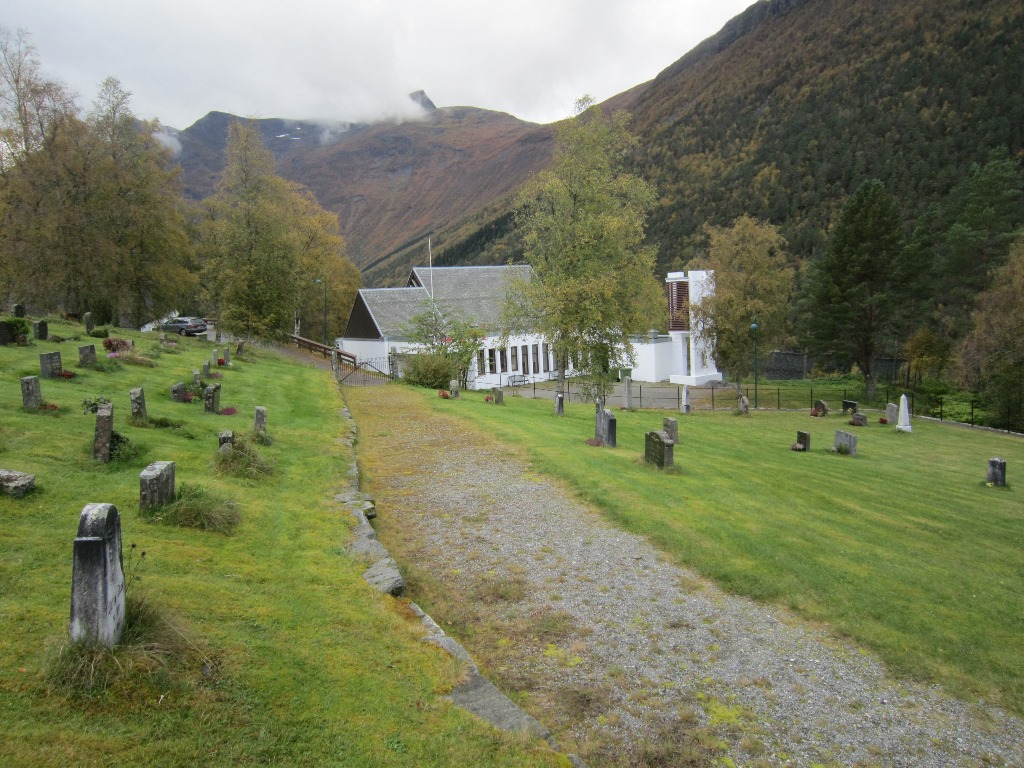 Kilsfjord kirke